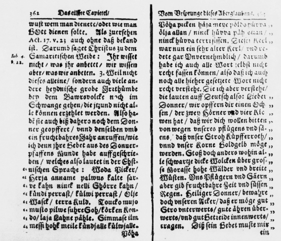 Piksepapp Vihtla Jürgeni järgi üles kirjutatud pikse palve Johann Gutslaffi raamatust "Kurtzer Bericht und Unterricht Von der Falsch-heilig genandten Bäche in Lieffland Wöhhanda" (Dorpt 1644, leheküljed 362 ja 363).